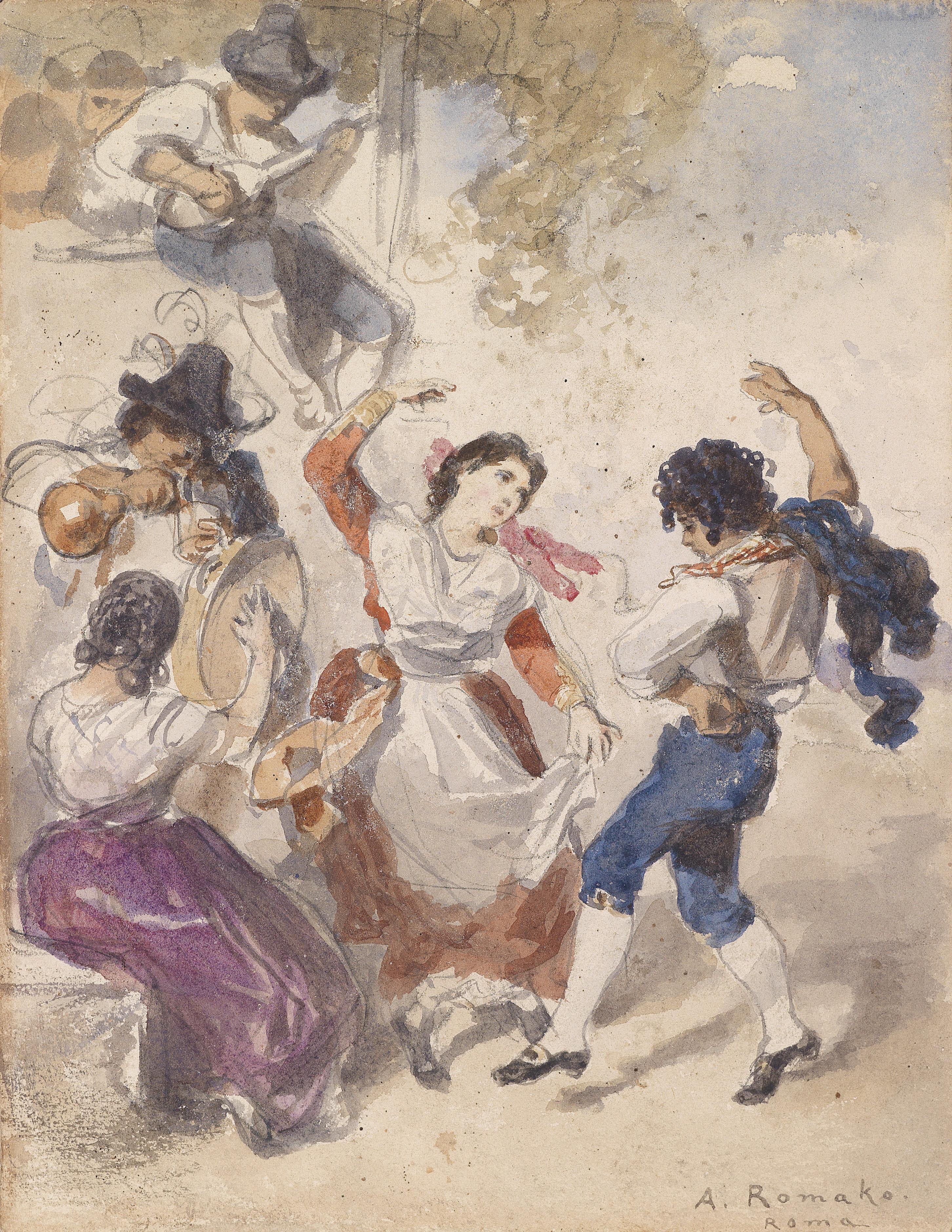 Tarantellatänzer und Mandolinenspielertitle QS:P1476,de:"Tarantellatänzer und Mandolinenspieler" label QS:Lde,"Tarantellatänzer und Mandolinenspieler"